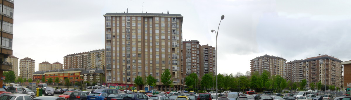 Santa Luzia auzoa (Gasteiz) / Barrio de Santa Lucía (Gasteiz)